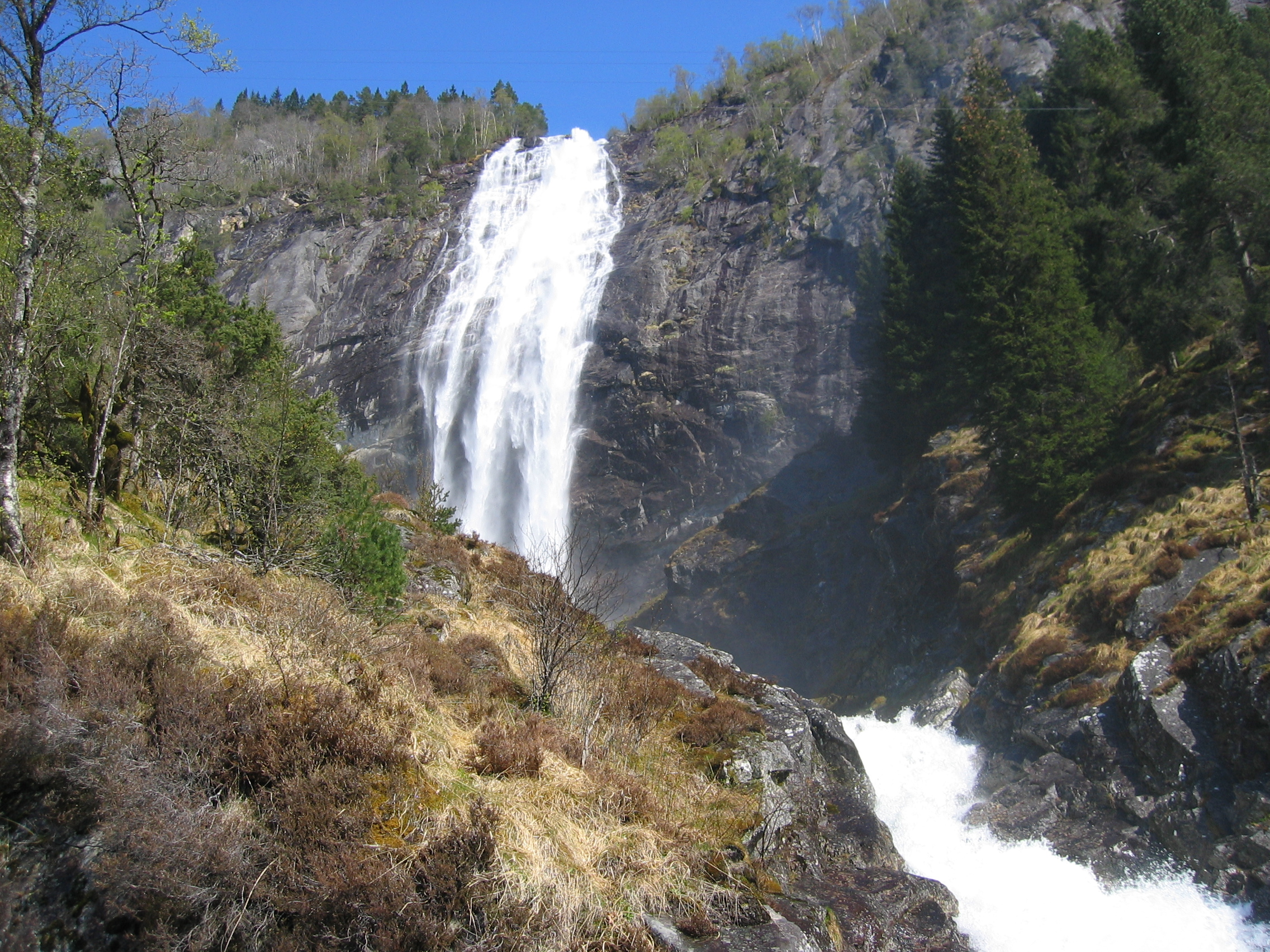 Kvinnafossen